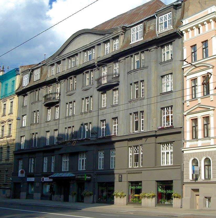 Īres nams, Rīga, Pulkveža Brieža iela 8